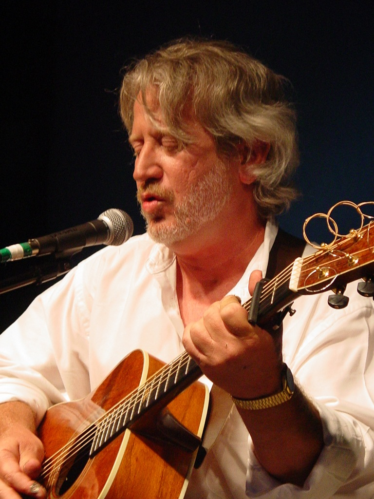 Vince Bell